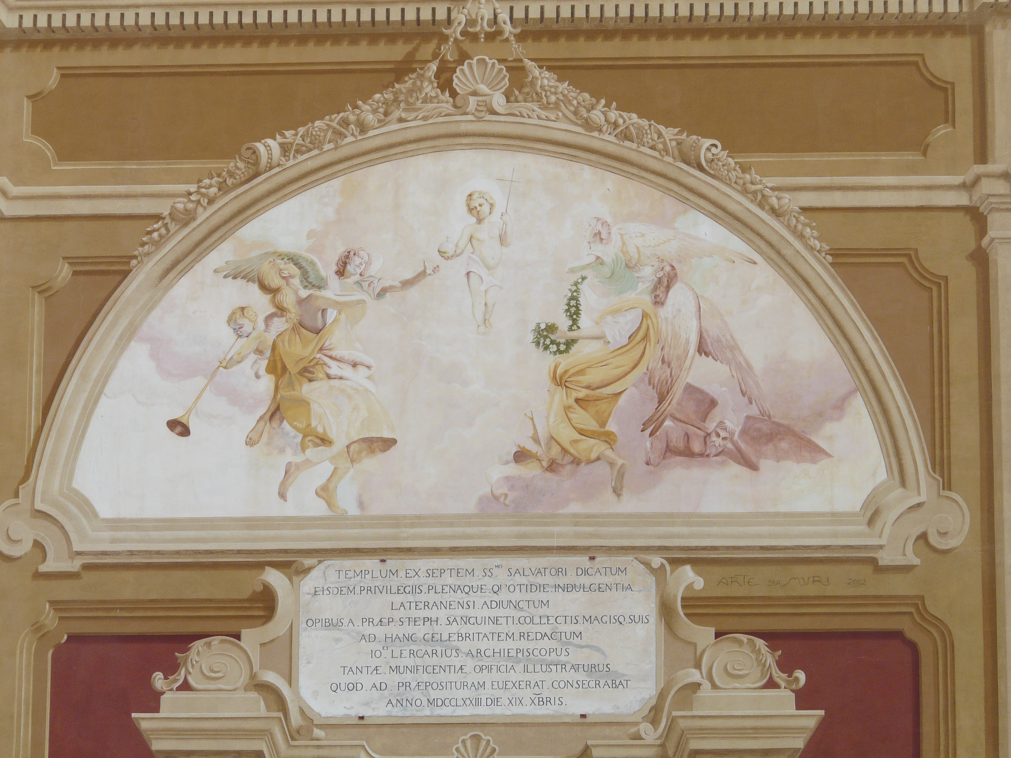 Chiesa di San Salvatore, Genova, Liguria, Italia